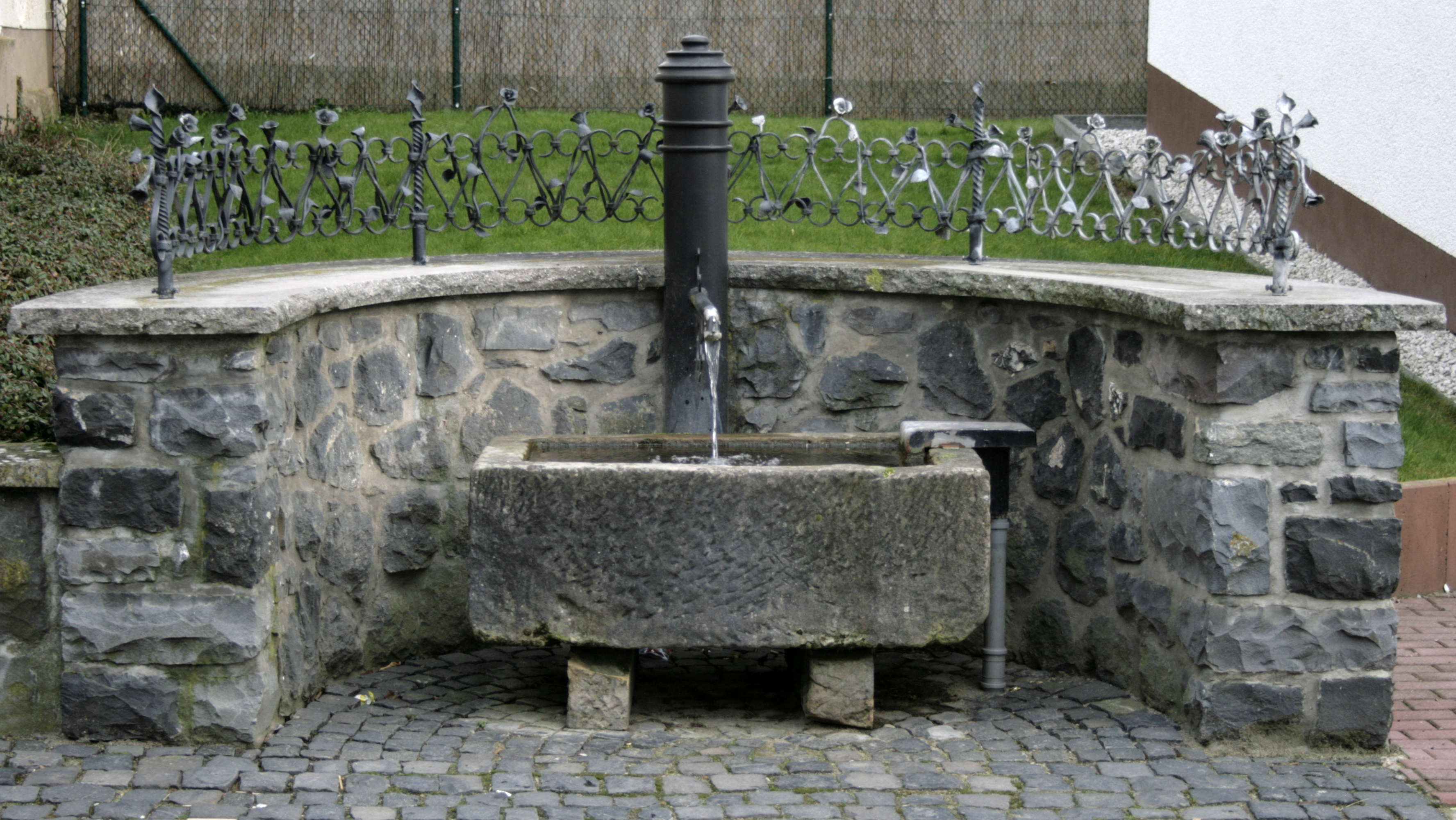 Laufbrunnen in Hadamar-Oberweyer, Deutschland